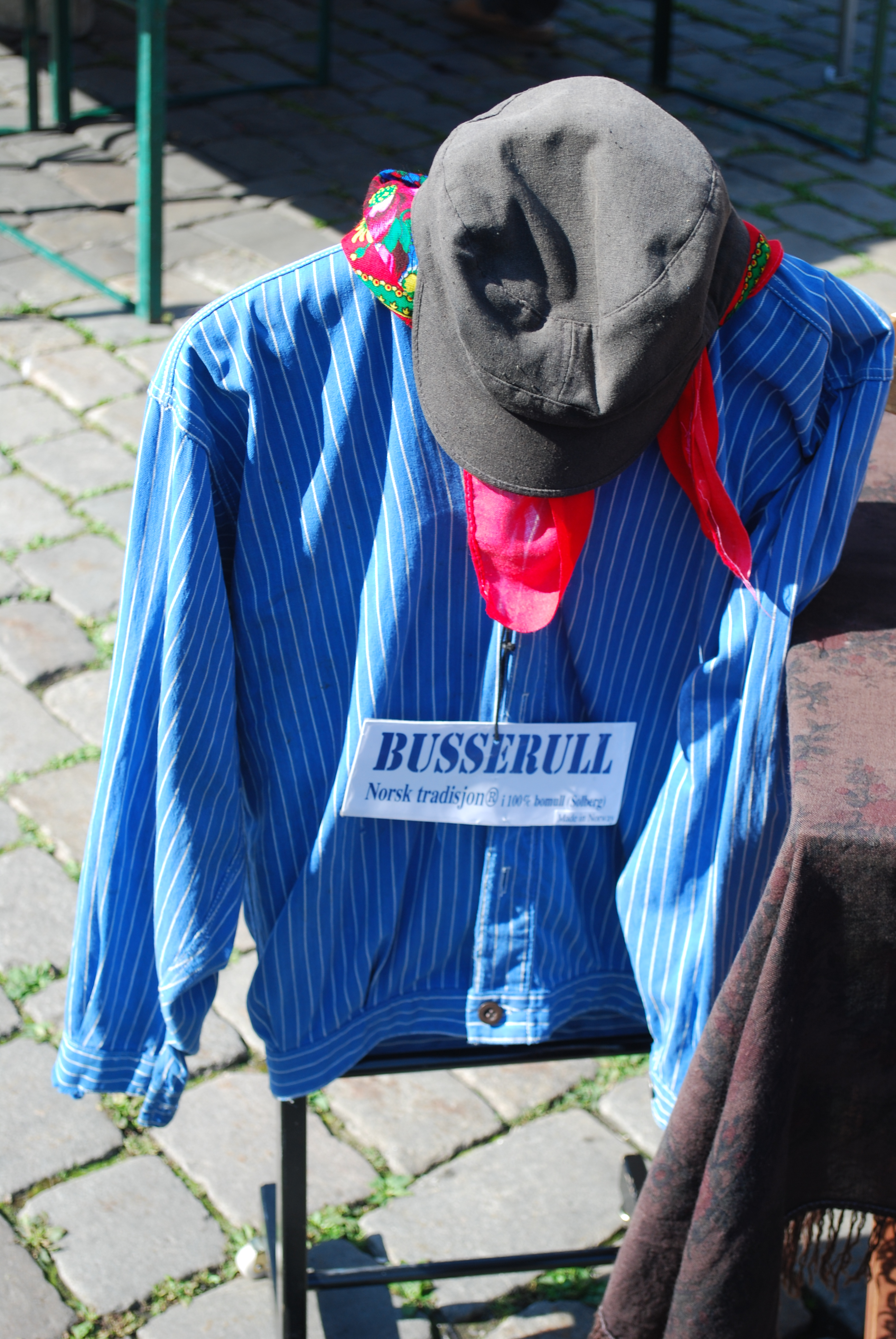 Busserull er en lett kofte eller trøye som fra 1800-tallet ble båret av menn utenpå skjorta.